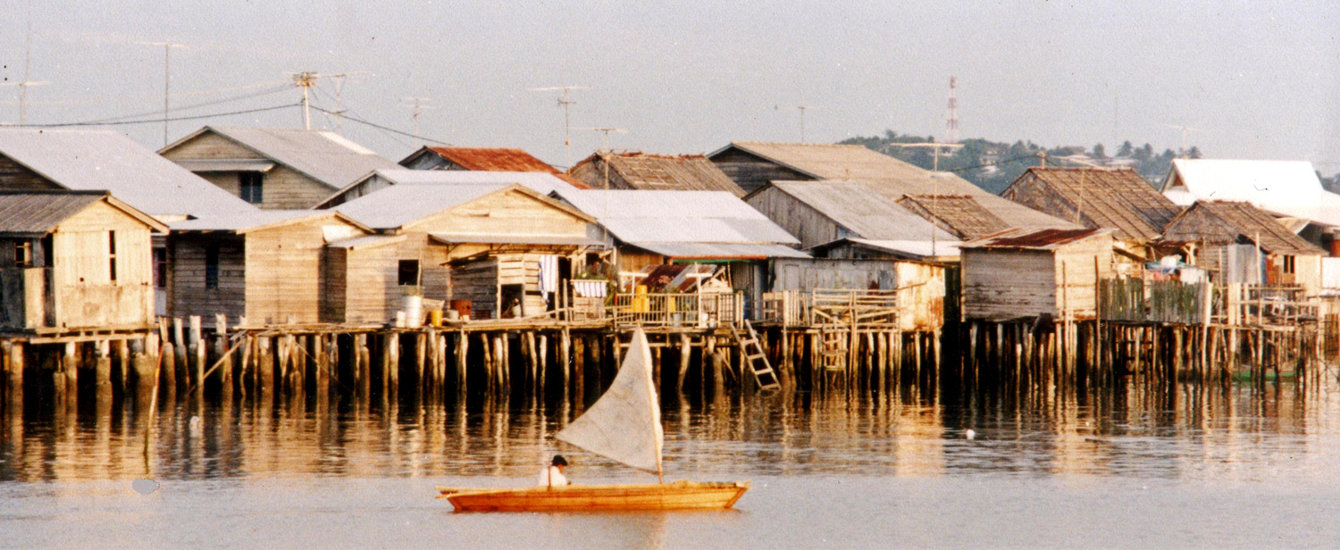 Village of Senggarang, near Tanjung Pinang, Riau, Indonesia.